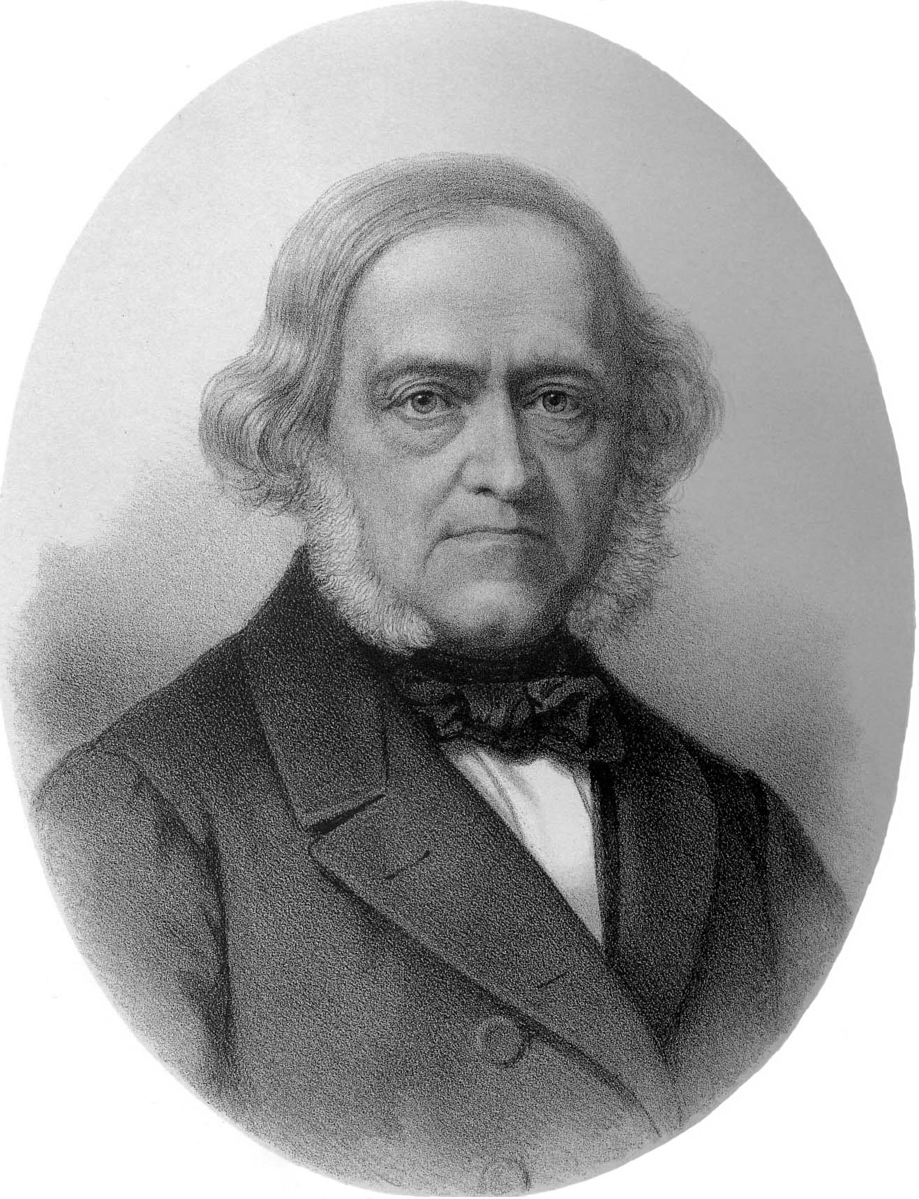 Jacob Nils Tersmeden. Godsägare, diplomat och politiker.